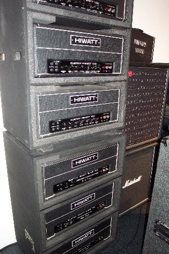 Photos de l'exposition "Pink Floyd Interstellar" à la Cité de la Musique (Porte de la Villette, Paris). Read the story at . Lire le compte-rendu de l'expo sur